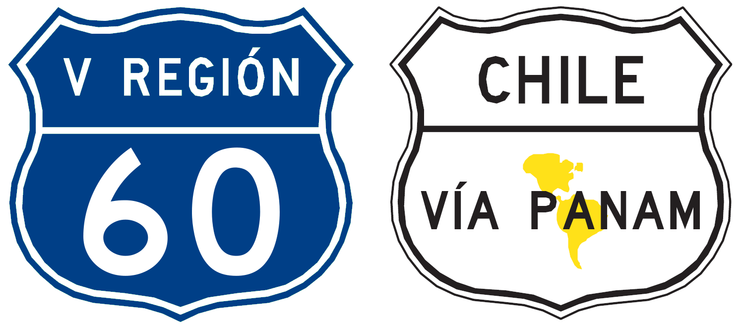 Escudo de la Ruta CH-60